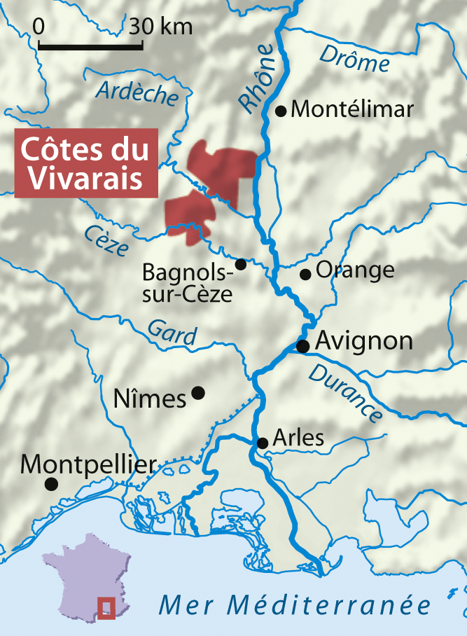 Lage der Appellation „Côtes du Vivarais“ im unteren Rhônetal